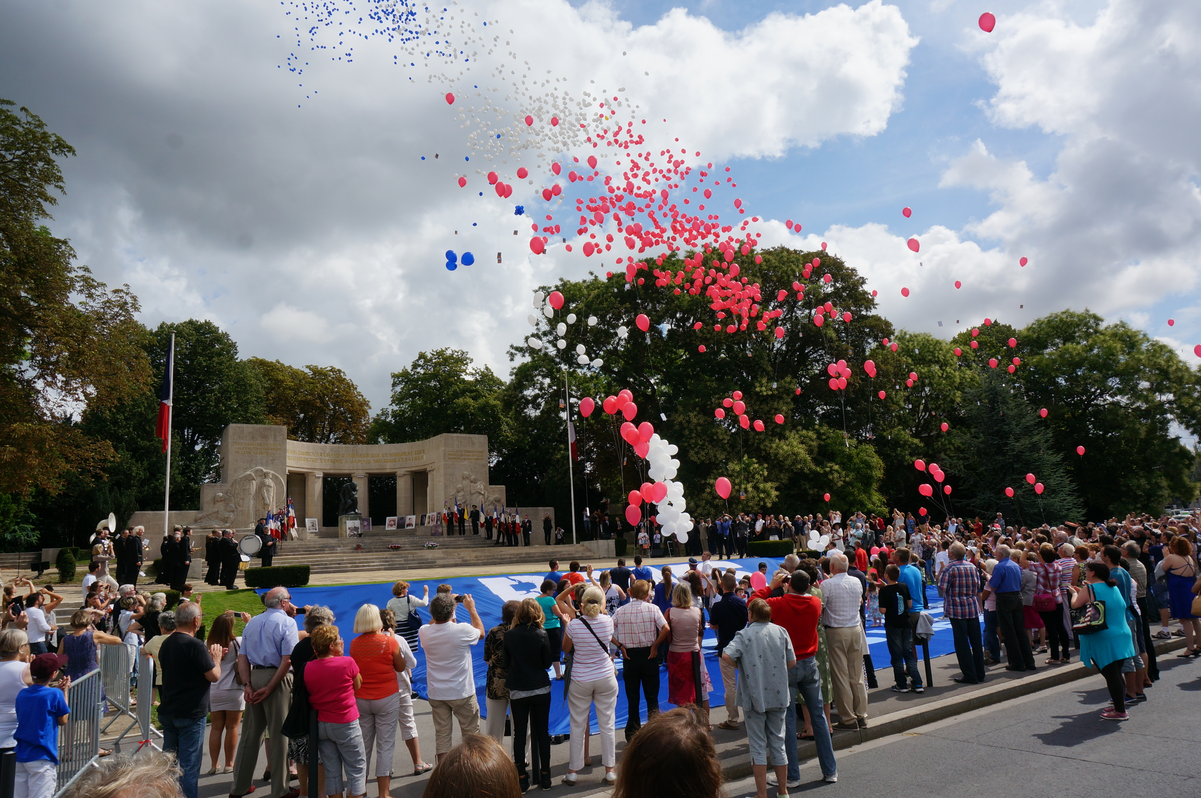 Reims commémore ses héros devant le Monument aux morts (Reims), centenaire de la déclaration de guerre.